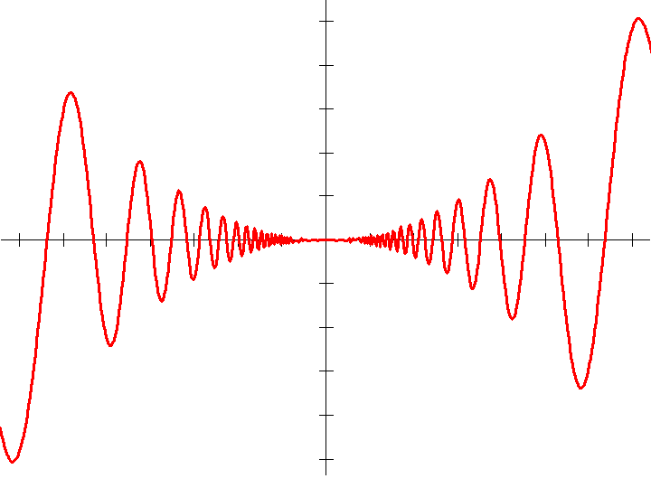 f(x)=x2sin(1/x), f(0)=0. A példa mutatja, hogy nem elég, hogy a függvény egy-egy pontban balról és jobbról ellenkező előjelű deriváltakkal rendelkezik. A deriváltnak egy egész bal oldali intervallumban kell ugyanolyannak lennie és különböznie egy egész jobb oldali intervallumbeli előjeltől